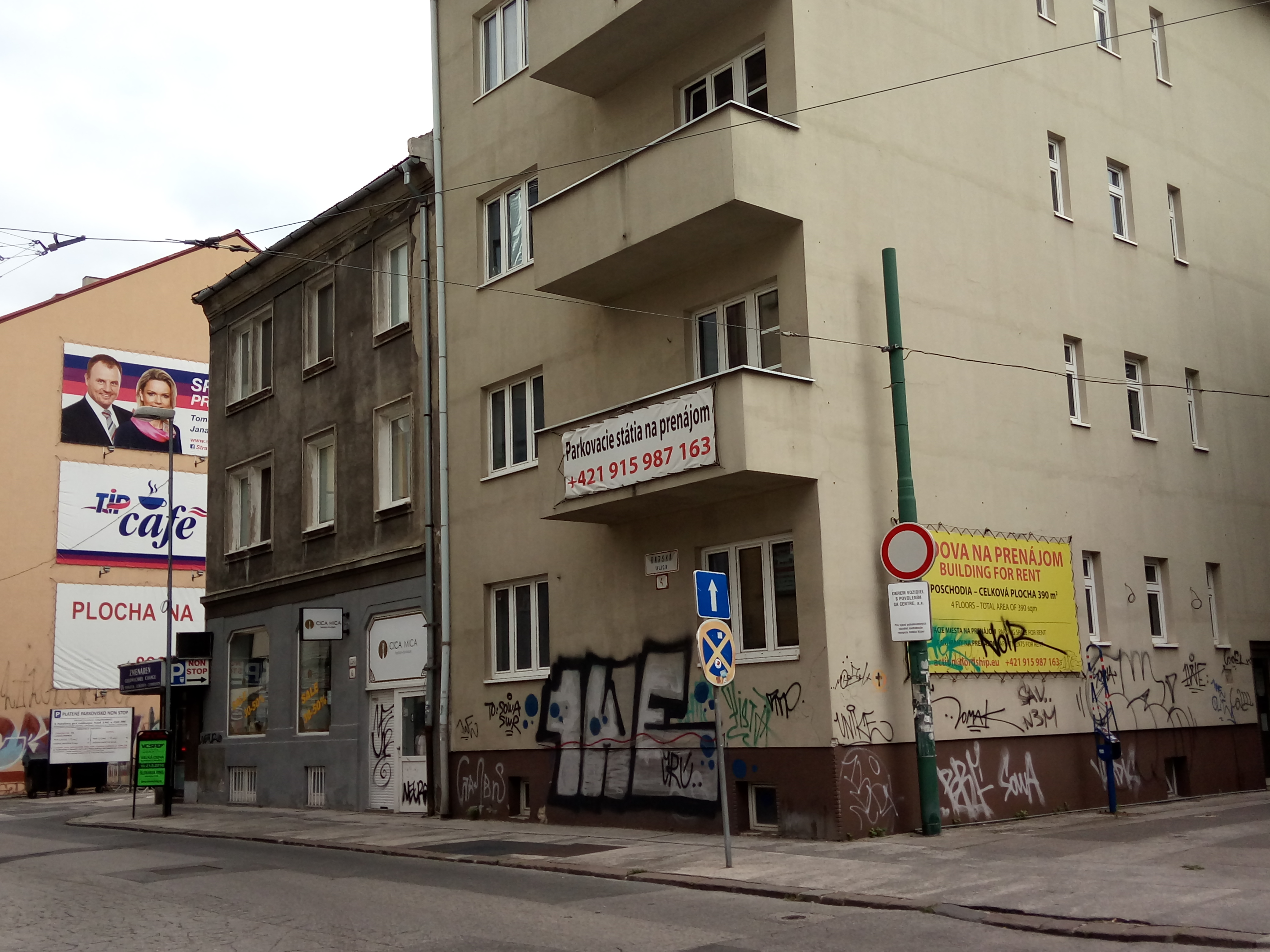 Rajská 4, Staré Mesto, Bratislava